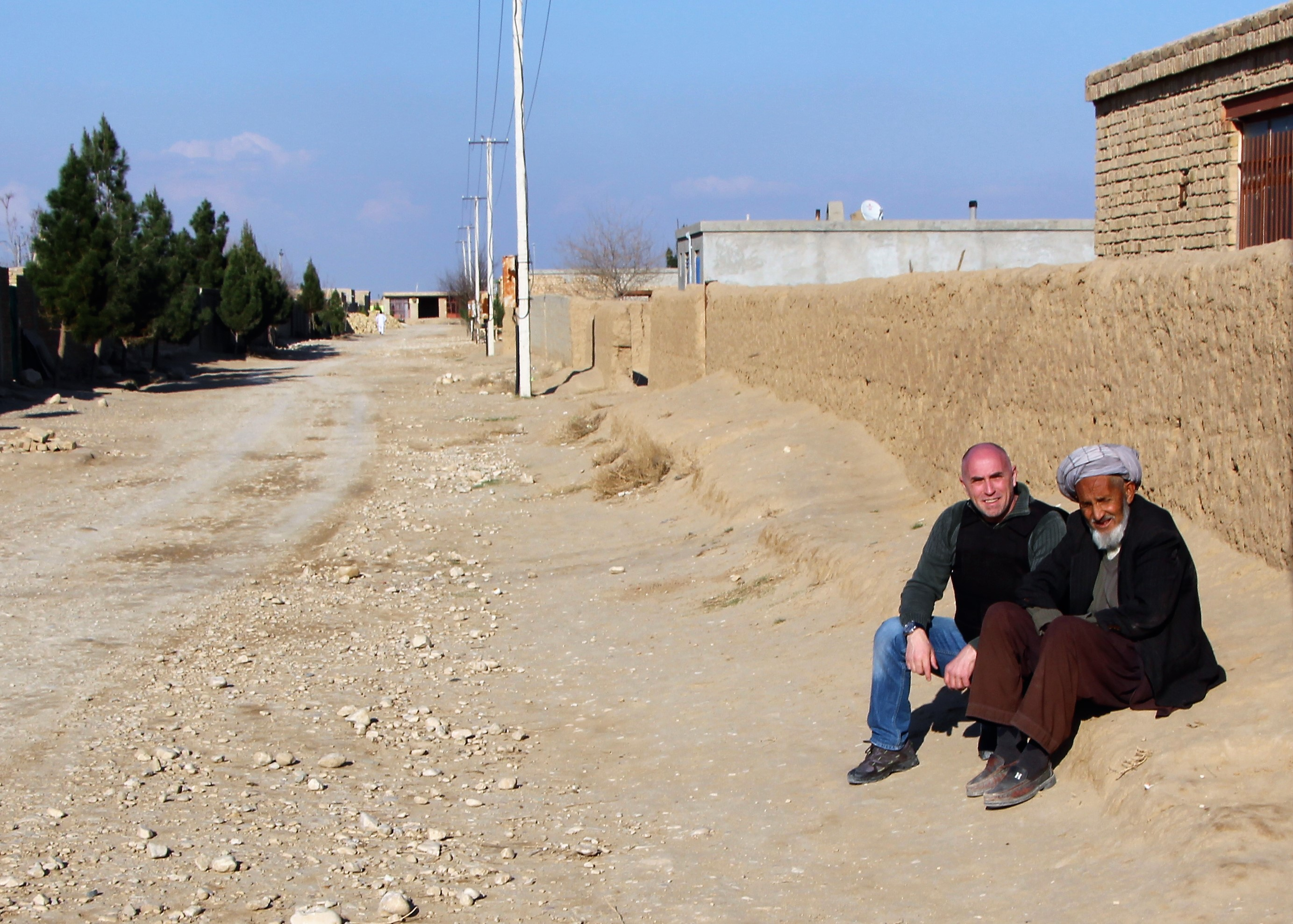 Afghanistan